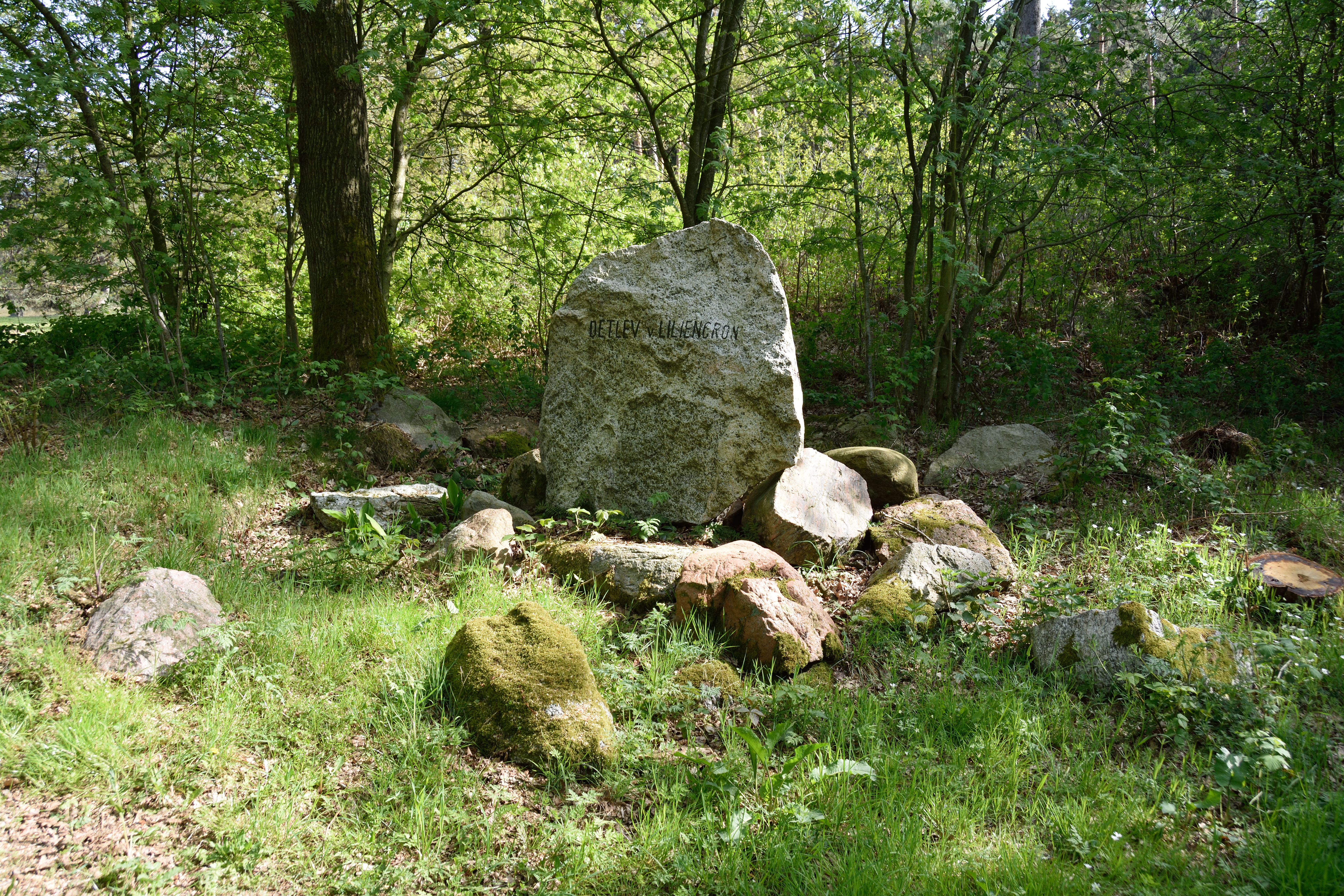 Impressionen aus dem Naturschutzgebiet "Heideflächen bei Kellinghusen" in Schleswig-Holstein vom Mai 2015 Es ist das Naturschutzgebiet mit der Nummer 22